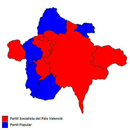 Partits polítics més votats als municipis dels Ports (País Valencià) després de les eleccions municipals de 2007.